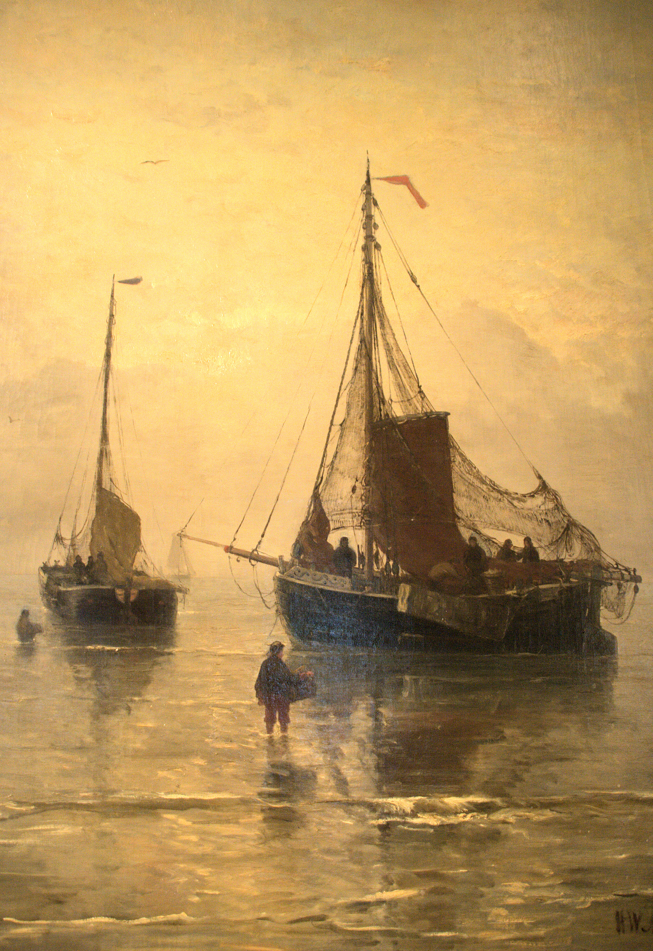 Aankomst van de Vis